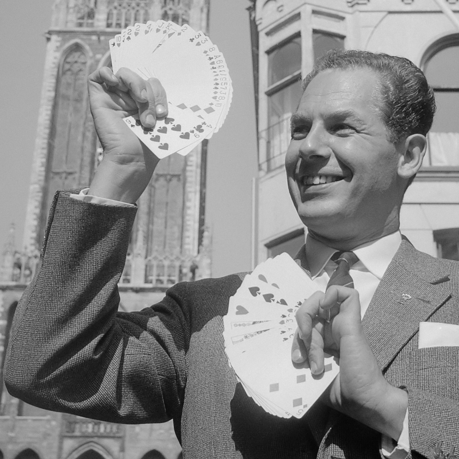 Utrecht magisch middelpunt. Fred Kaps 16 juni 1961